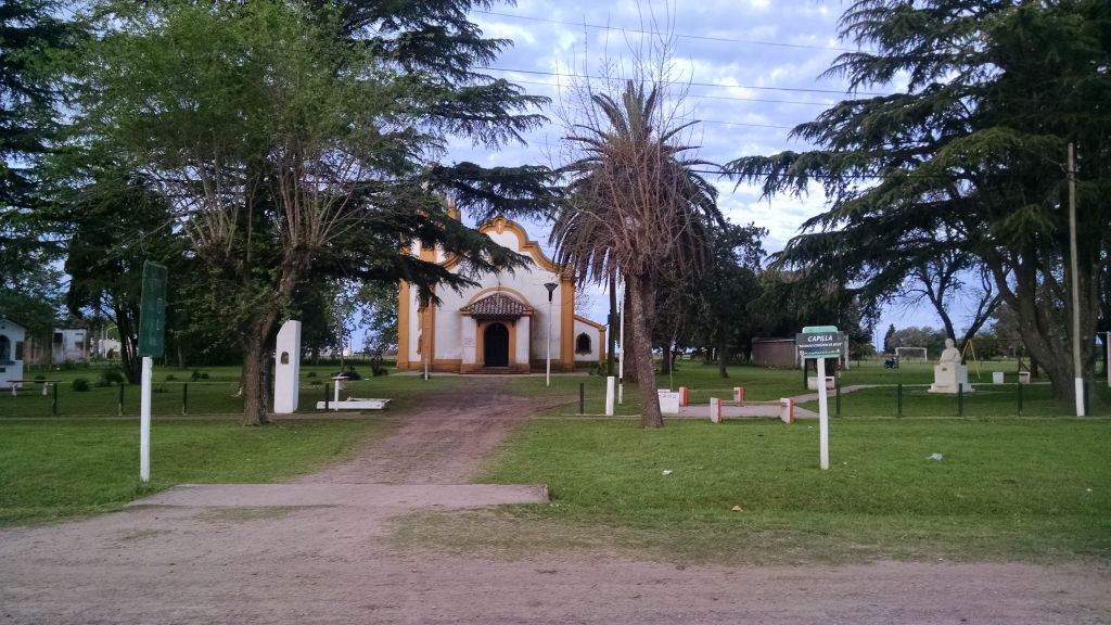 paraiso, suburb